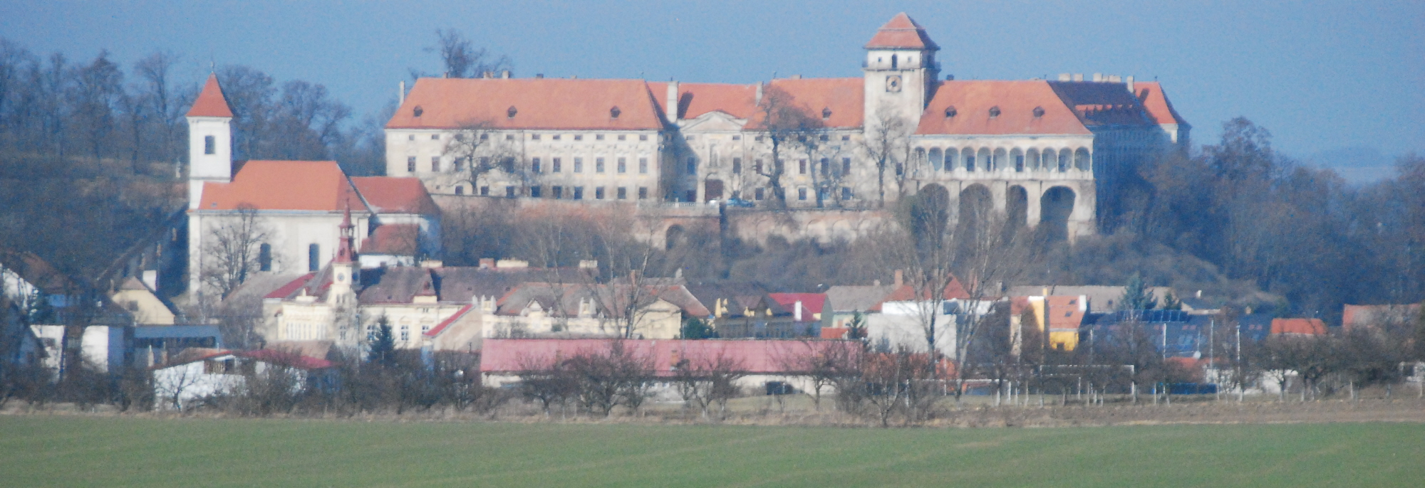 Schloss Jaroslavice in Tschechien von Süden